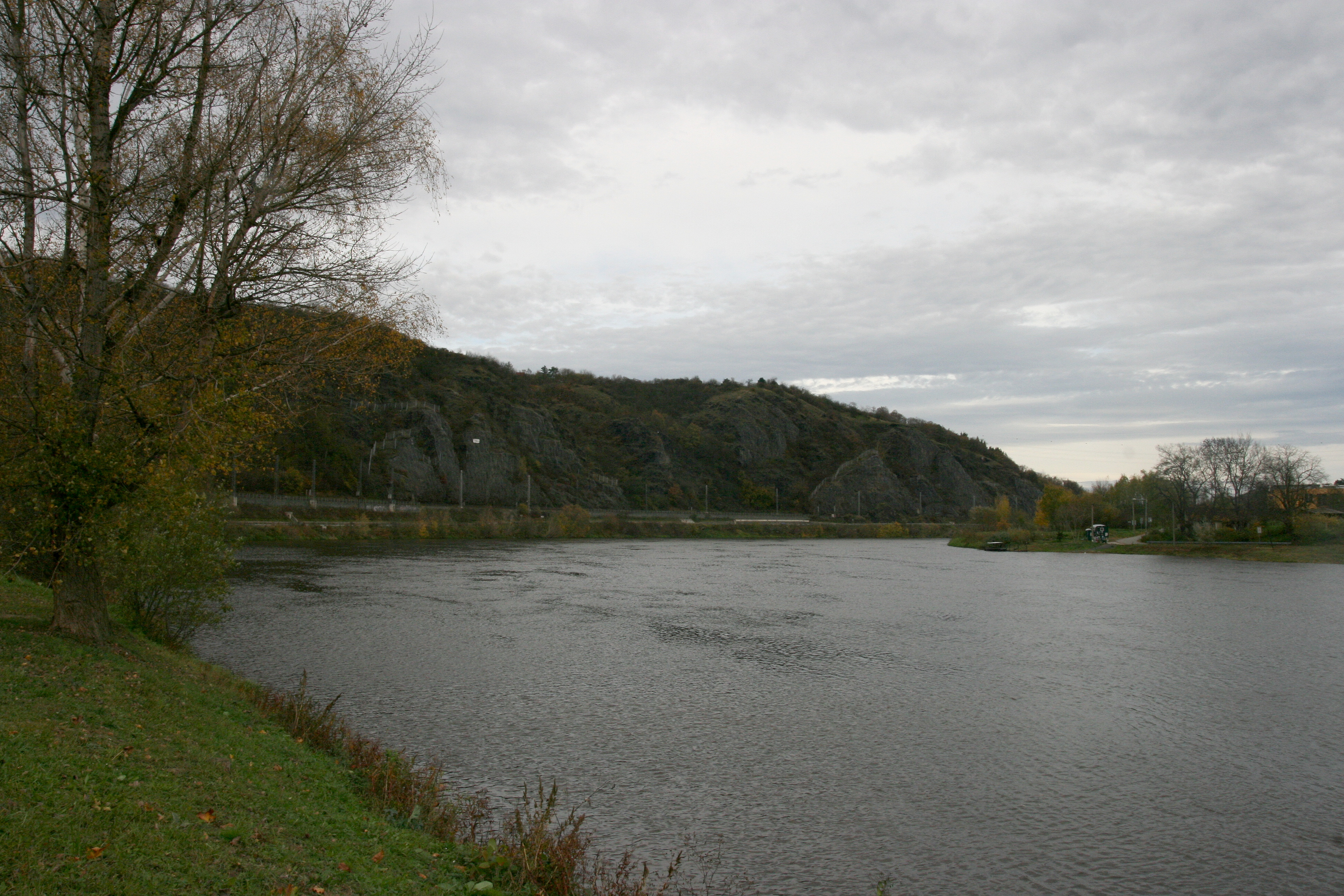 Celkový pohled na PP Sedlecké skály.